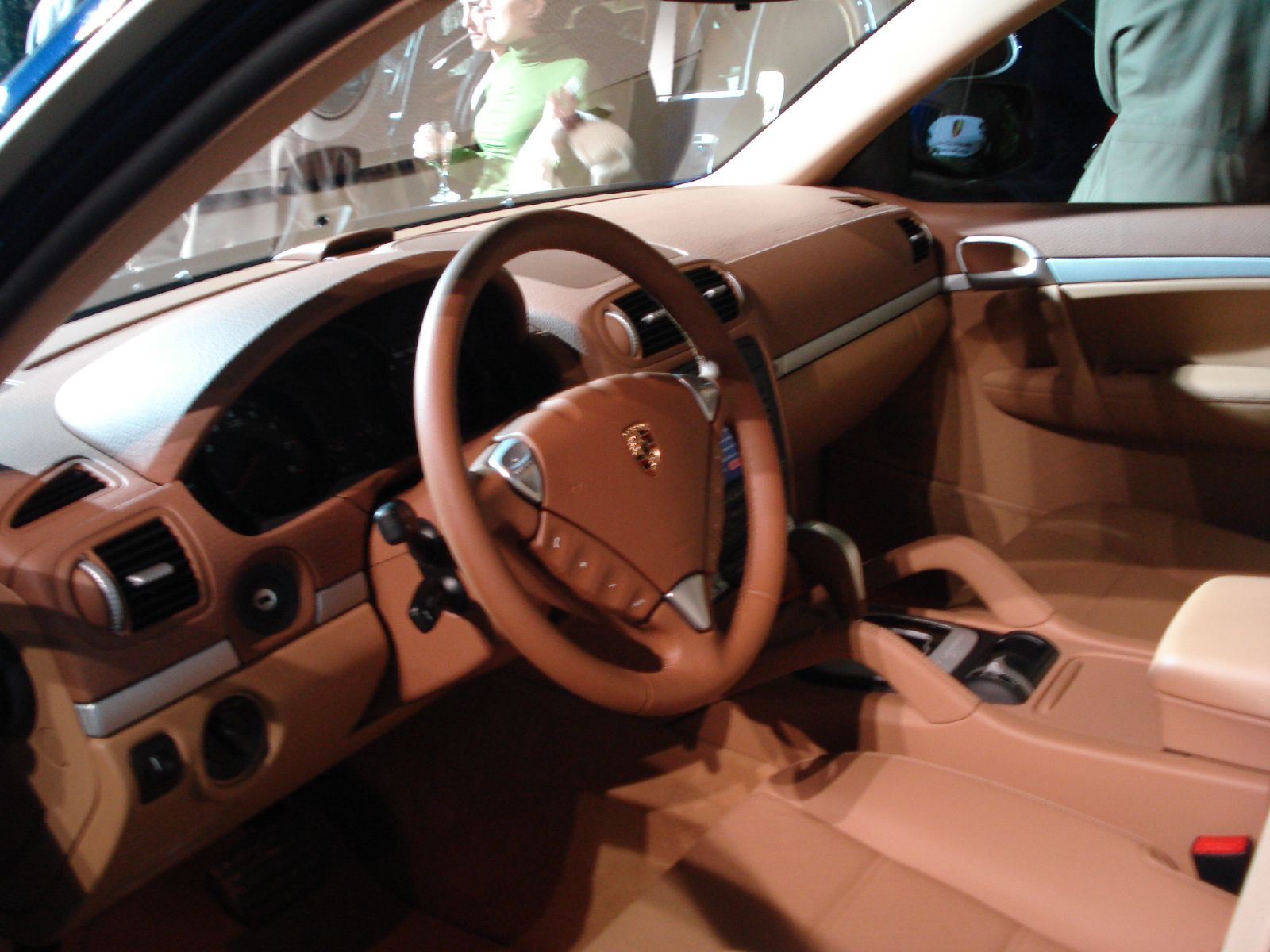 2007 Porsche Cayenne interior